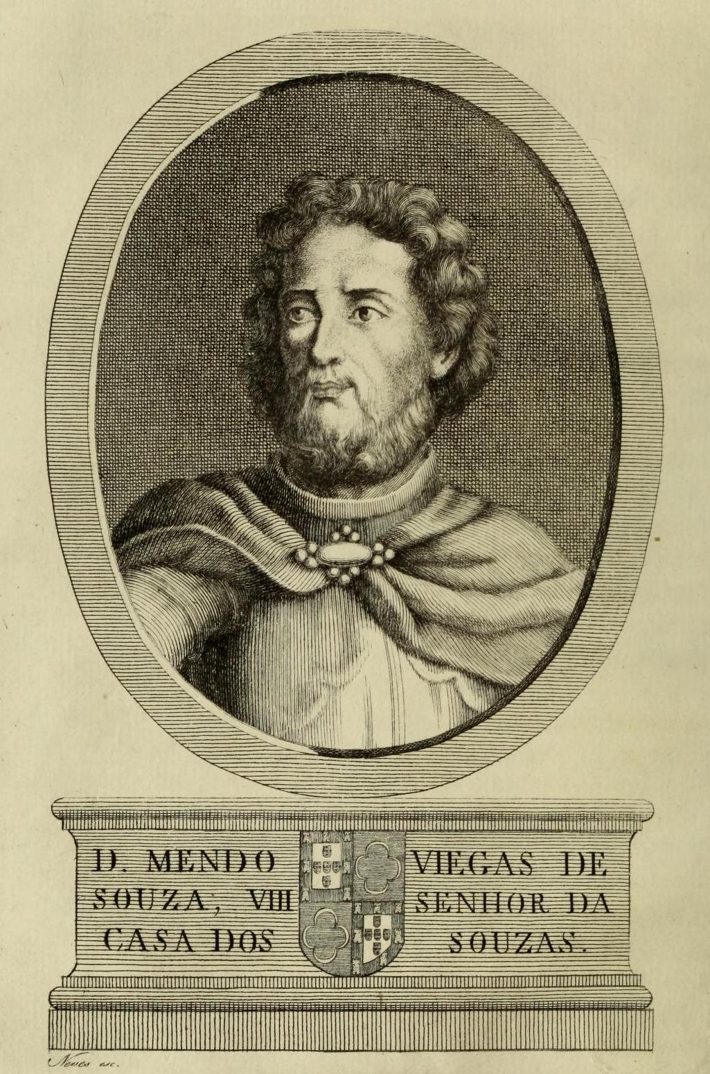 Mem ou Mendo Viegas de Sousa (1070 - 1130).